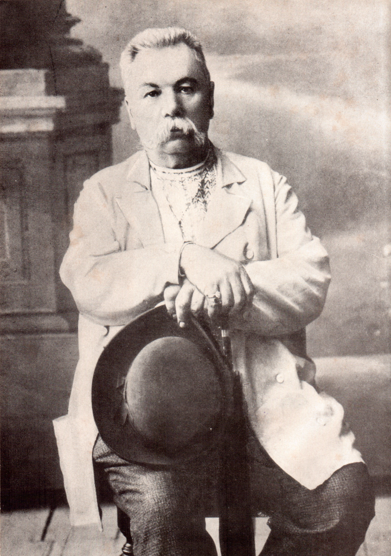 Фото Марка Кропивницького 1906 року.